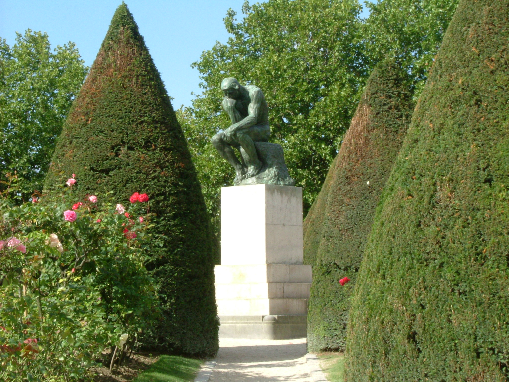 Garten des Musée Rodin - "Der Denker"